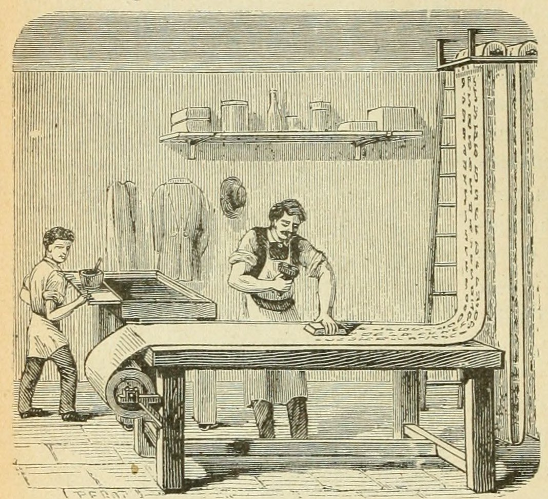 Le tour de la France par deux enfants, par George Bruno, manuel scolaire, édition de 1904